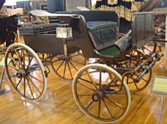 A phaeton car Wagenburg, Schloß Schönbrunn